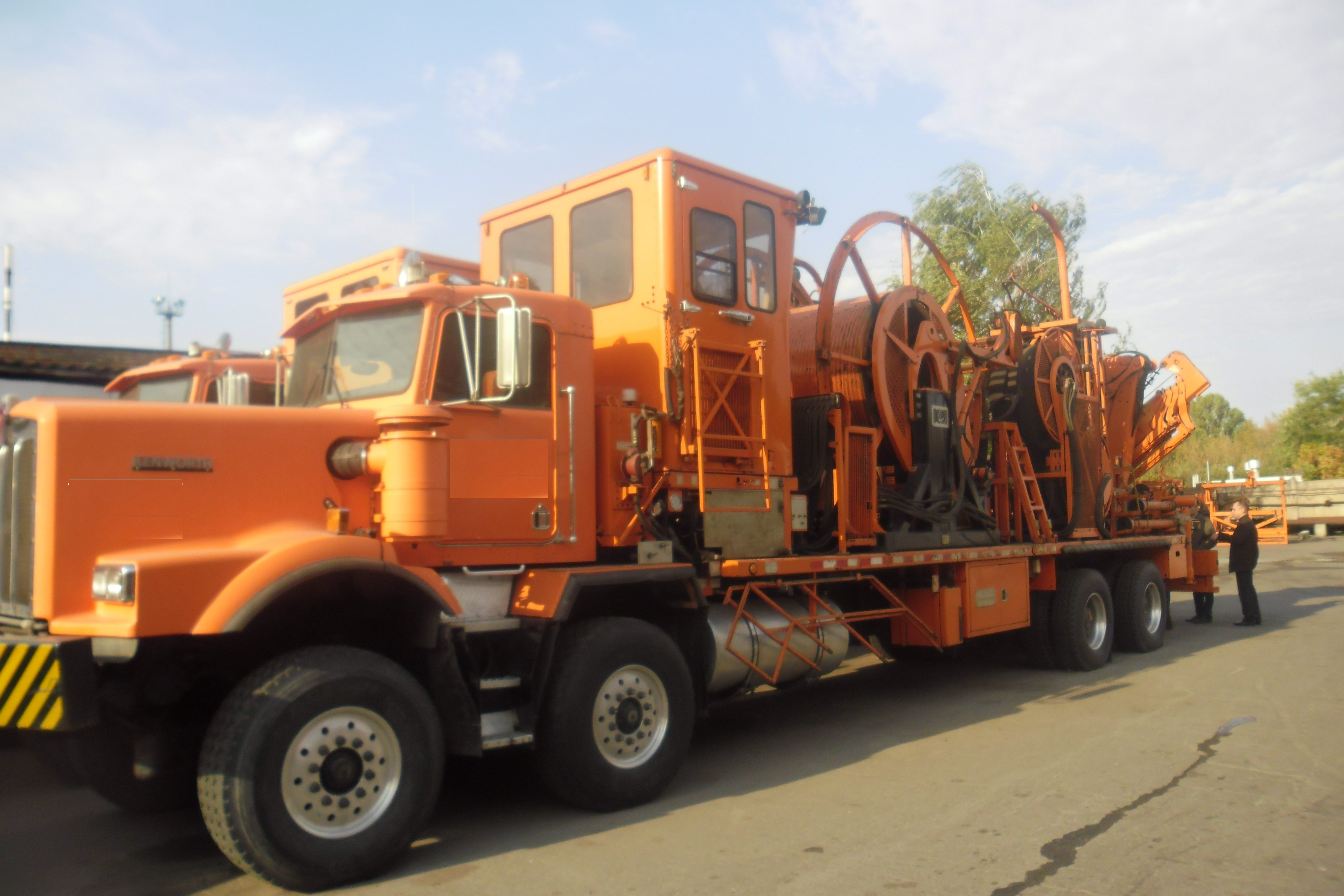 Фото